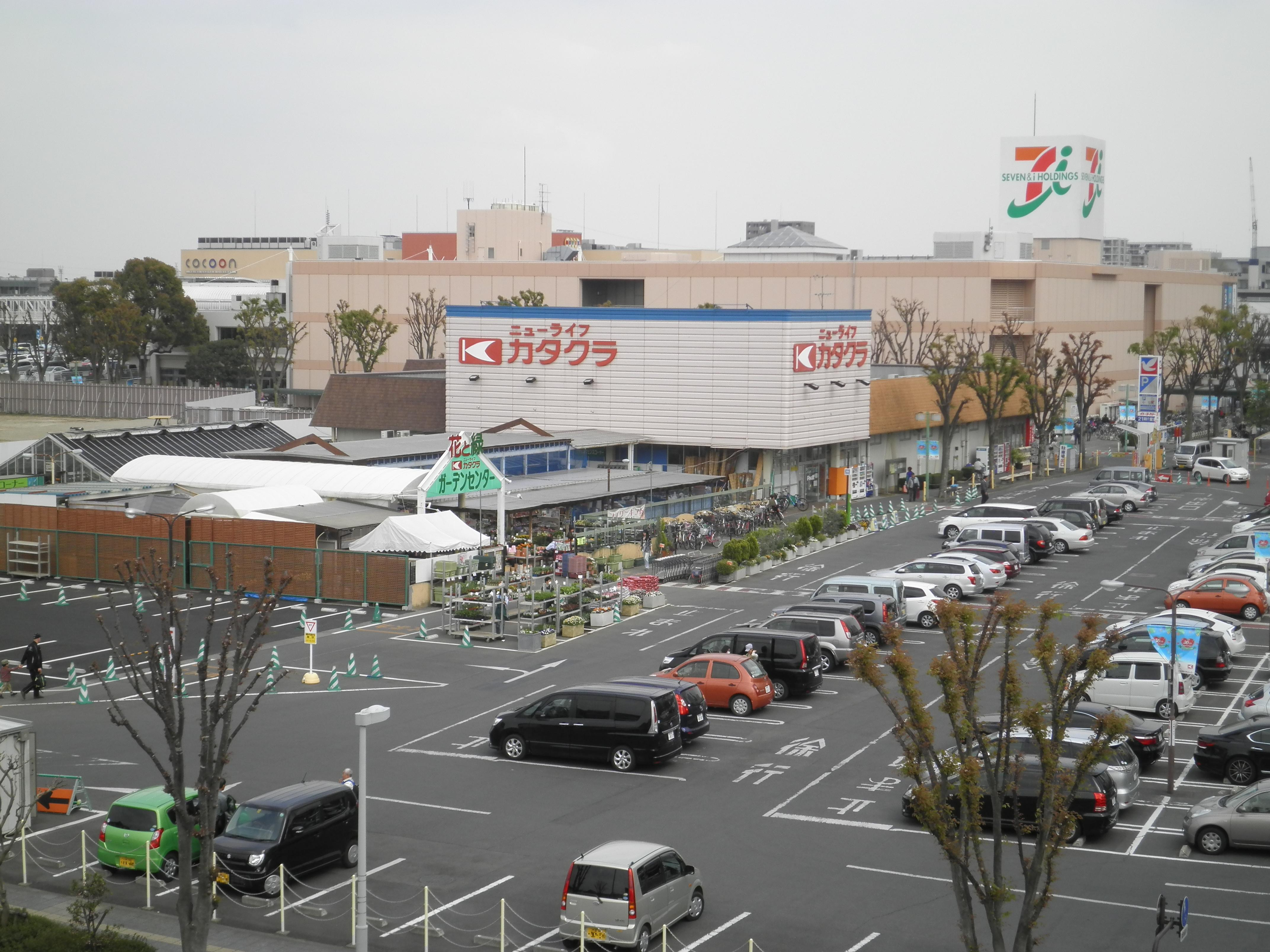 片倉工業株式会社が埼玉県さいたま市大宮区吉敷町にて運営する商業施設、「大宮カタクラパーク」。さいたま新都心の13街区・17街区を形成する。写真奥がイトーヨーカドー大宮店、手前がニューライフカタクラ大宮店、左上に見えるのがコクーン新都心の一部。